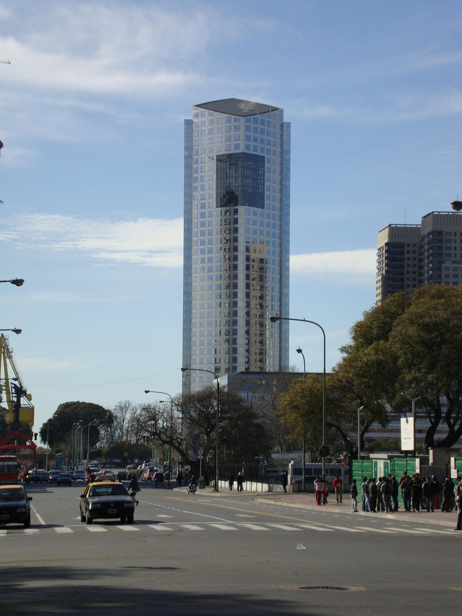 Torre Repsol YPF, del arquitecto César Pelli, en el barrio Puerto Madero, de Buenos Aires Argentina.